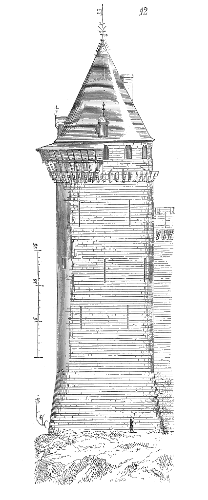 ... Cette construction est merveilleusement exécutée en assises de 40 à 50 centimètres, et n'a subi aucune altération, malgré le chevauchement des piles. Le talus extérieur descend à 8 mètres en contre-bas du niveau K, sol de la cour. Une élévation extérieure prise en B (voy. le plan), fig. 12, complète notre description. Les hourds sont supposés placés sur une moitié des corbeaux ...